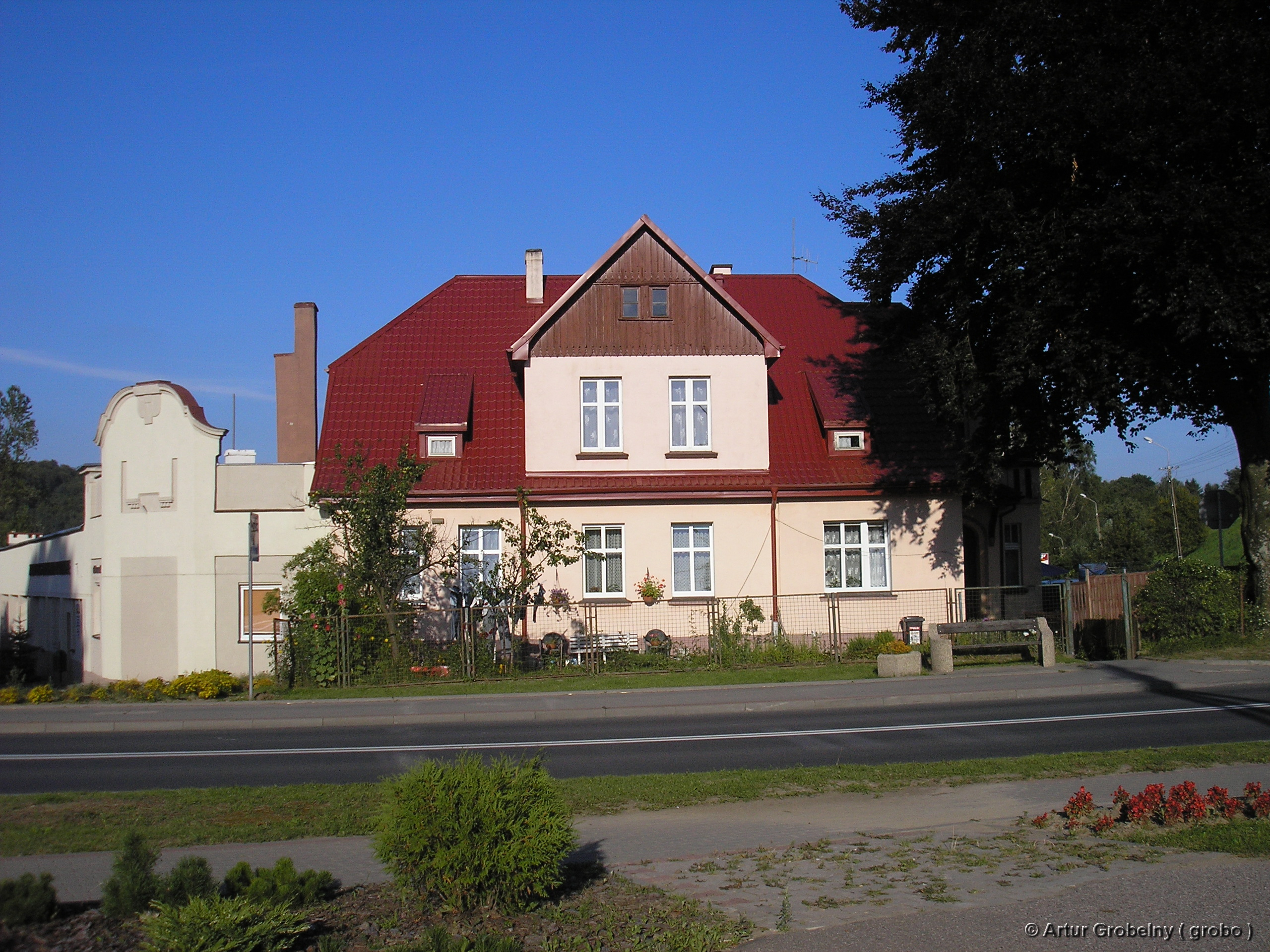 ulica Bobolicka 9, Polska, województwo zachodniopomorskie, powiat koszaliński, gmina Polanów, Polanów